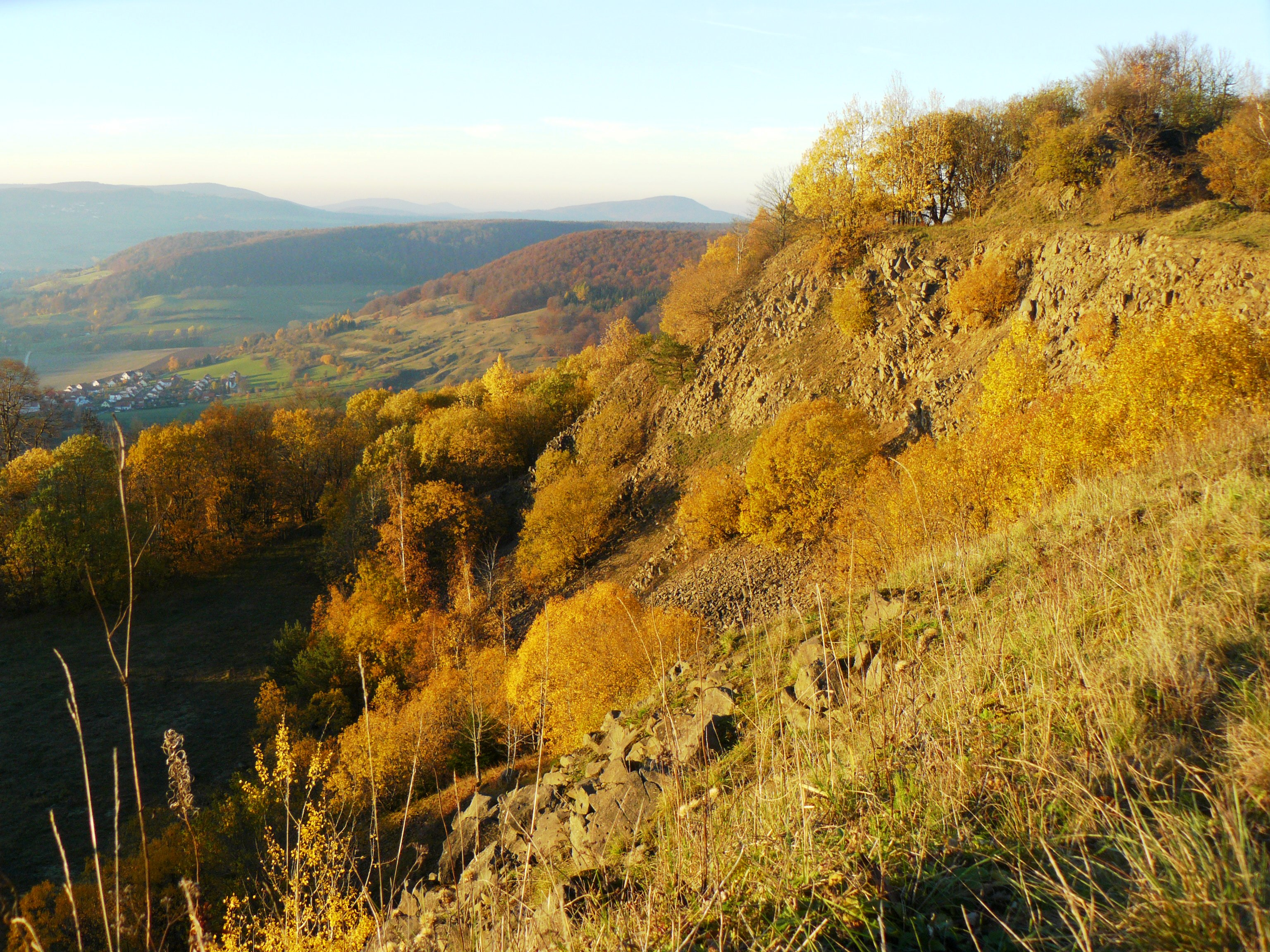 Ehemaliger Basalt-Steinbruch an der Nord-West-Flanke des Umpfen zwischen Fischbach und Kaltennordheim. Anmerkung: Der Standort ist nahe der Grenze des Naturschutzgebiets "Sommertal (Zonen 1/II BR Rhön)". Ob gerade noch drin oder nicht mehr, lässt sich anhand der Karten schlecht sagen. Es ist aber auf jeden Fall im etwas größeren FFH-Gebiet "Ibengarten - Wiesenthaler Schweiz - Sommertal" aufgenommen.